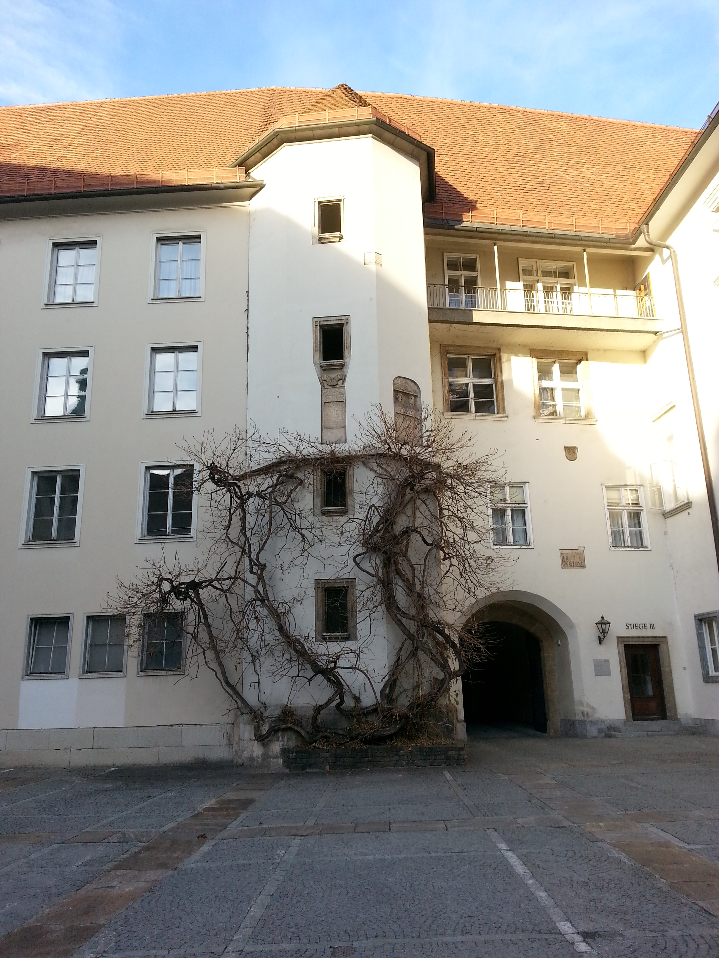 Der Treppenturm mit der Doppelwendeltreppe in der Grazer Burg.